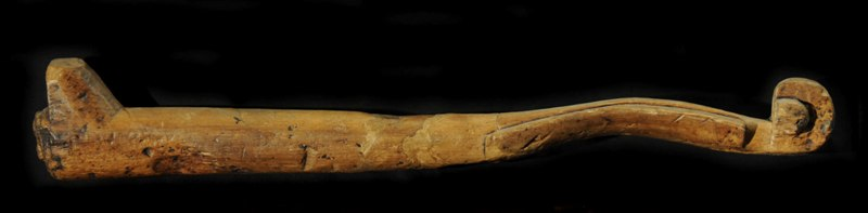 Caratterizzato da denti disposti nella parte centrale. Terminante con un pomolo modanato preceduto da due fori rettangolari.